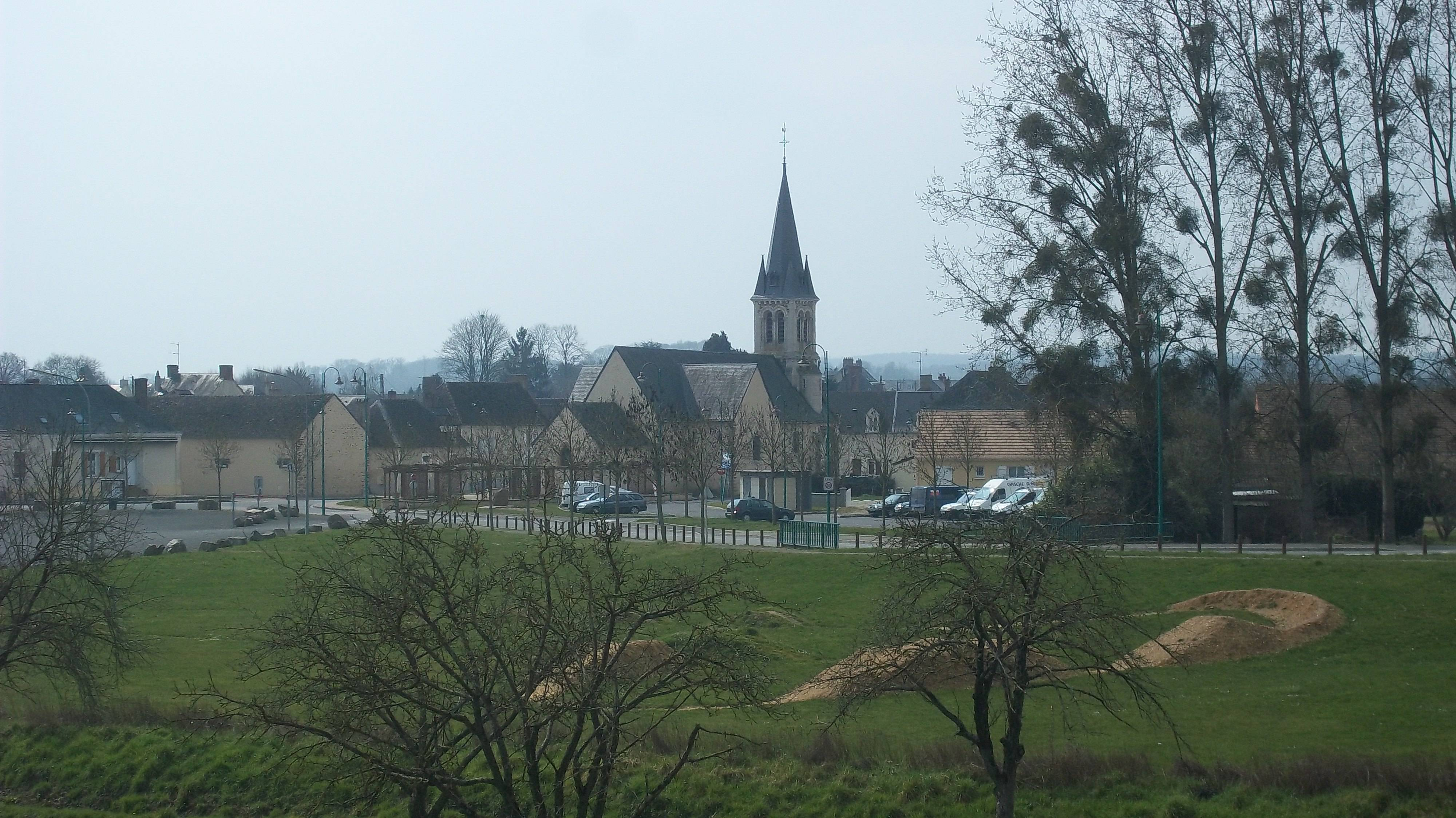 Sainte Jamme sur Sarthe - vue d'ensemble